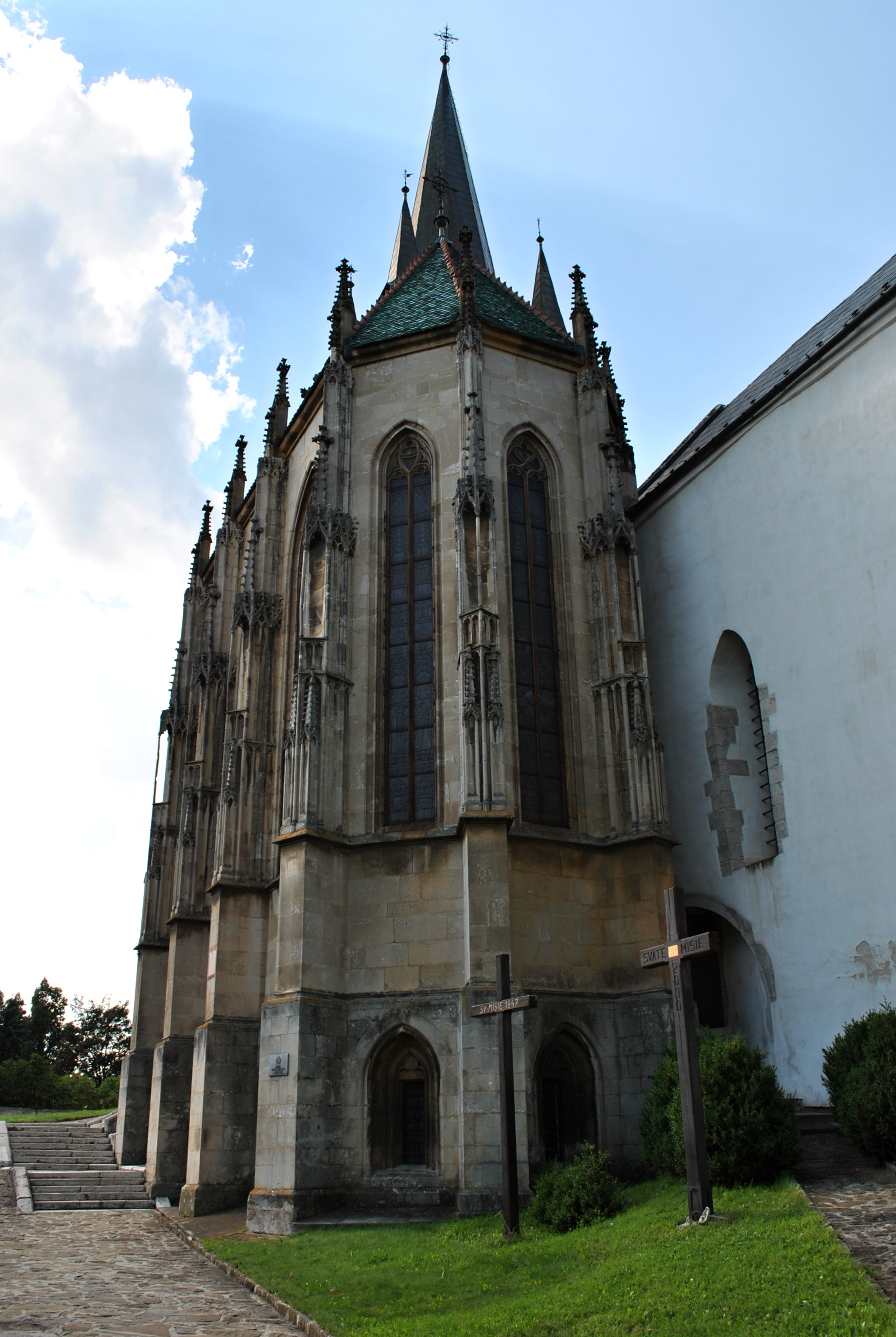 Kaplnka pohrebná